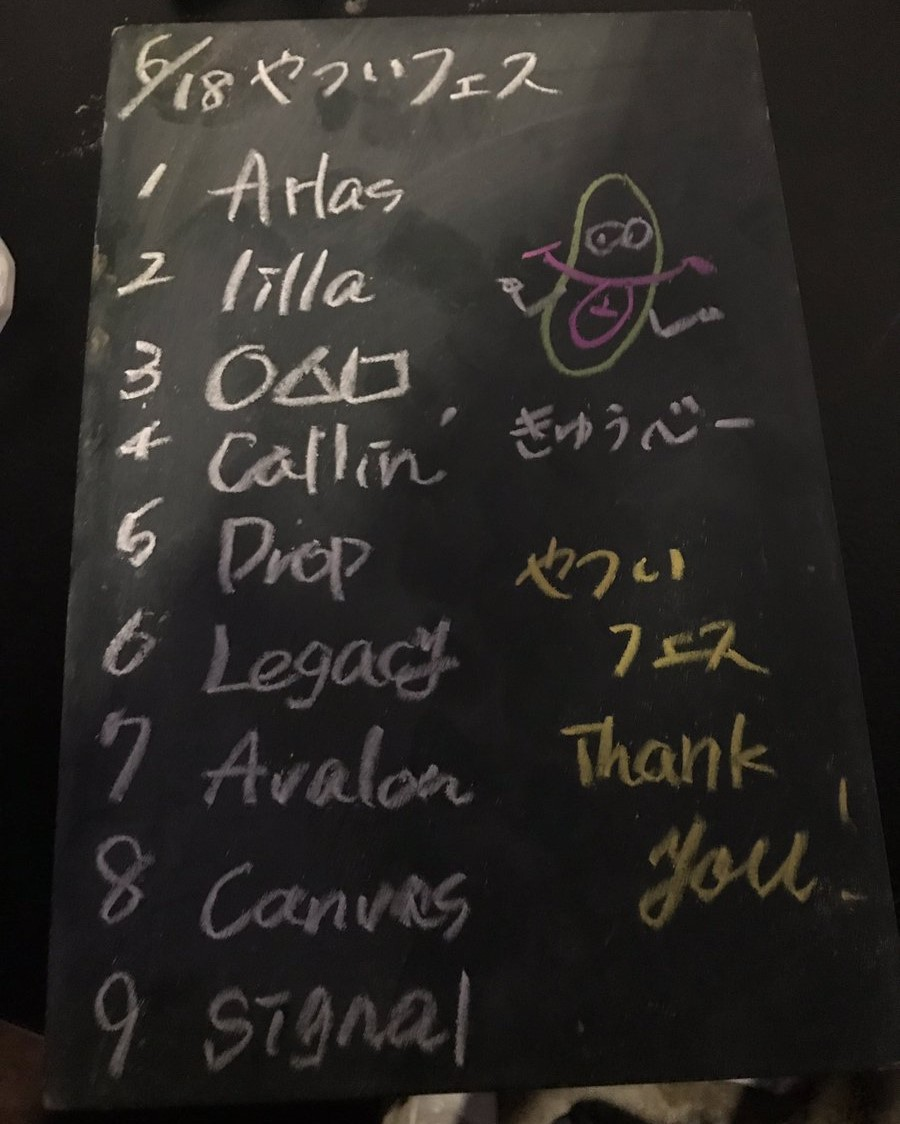 amiinAセトリボード(20170618(1))